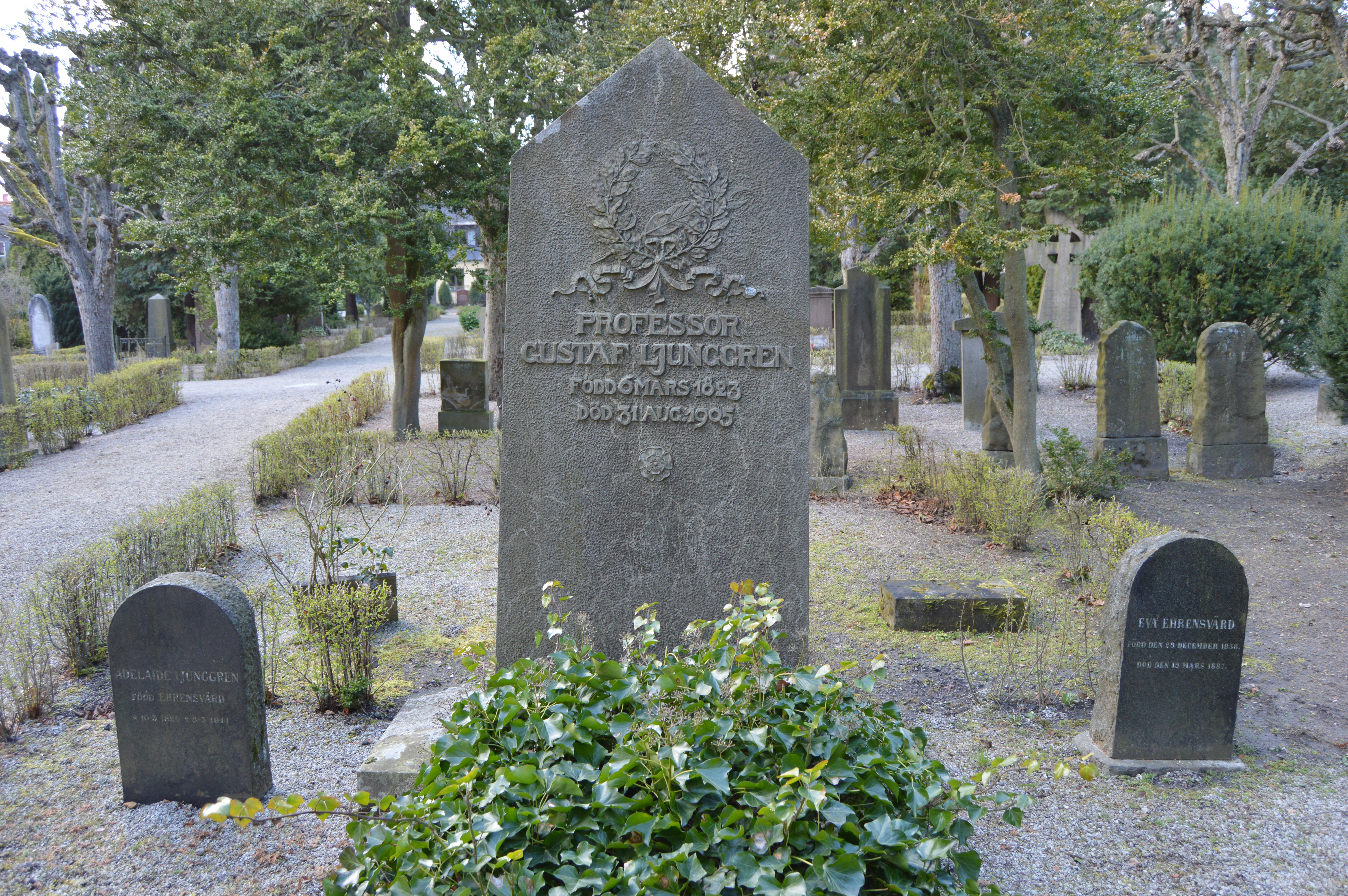 Gustaf Ljunggrens (1823-1905) grav på Östra kyrkogården i Lund.